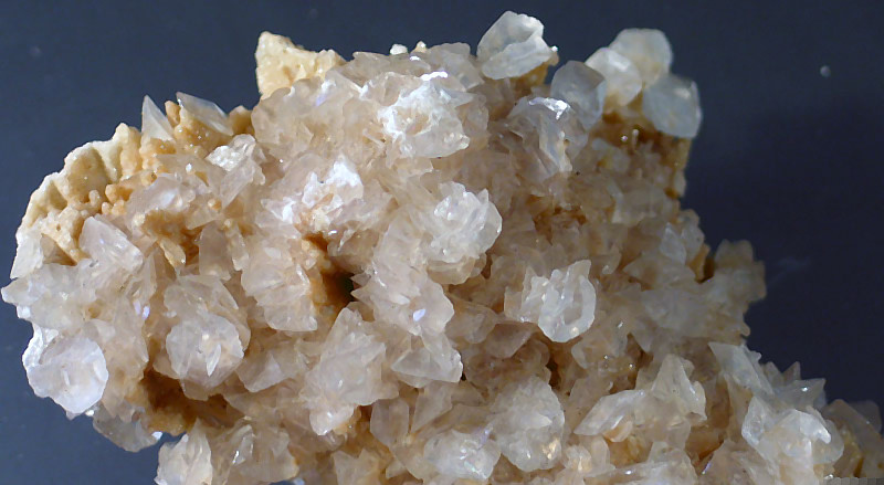 minerał; dolomit, pseudomorfoza po kalcycie, pochodzenie Rumunia; autor zdjęcia Stowarzyszenie Spirifer, 14.08.2006r.